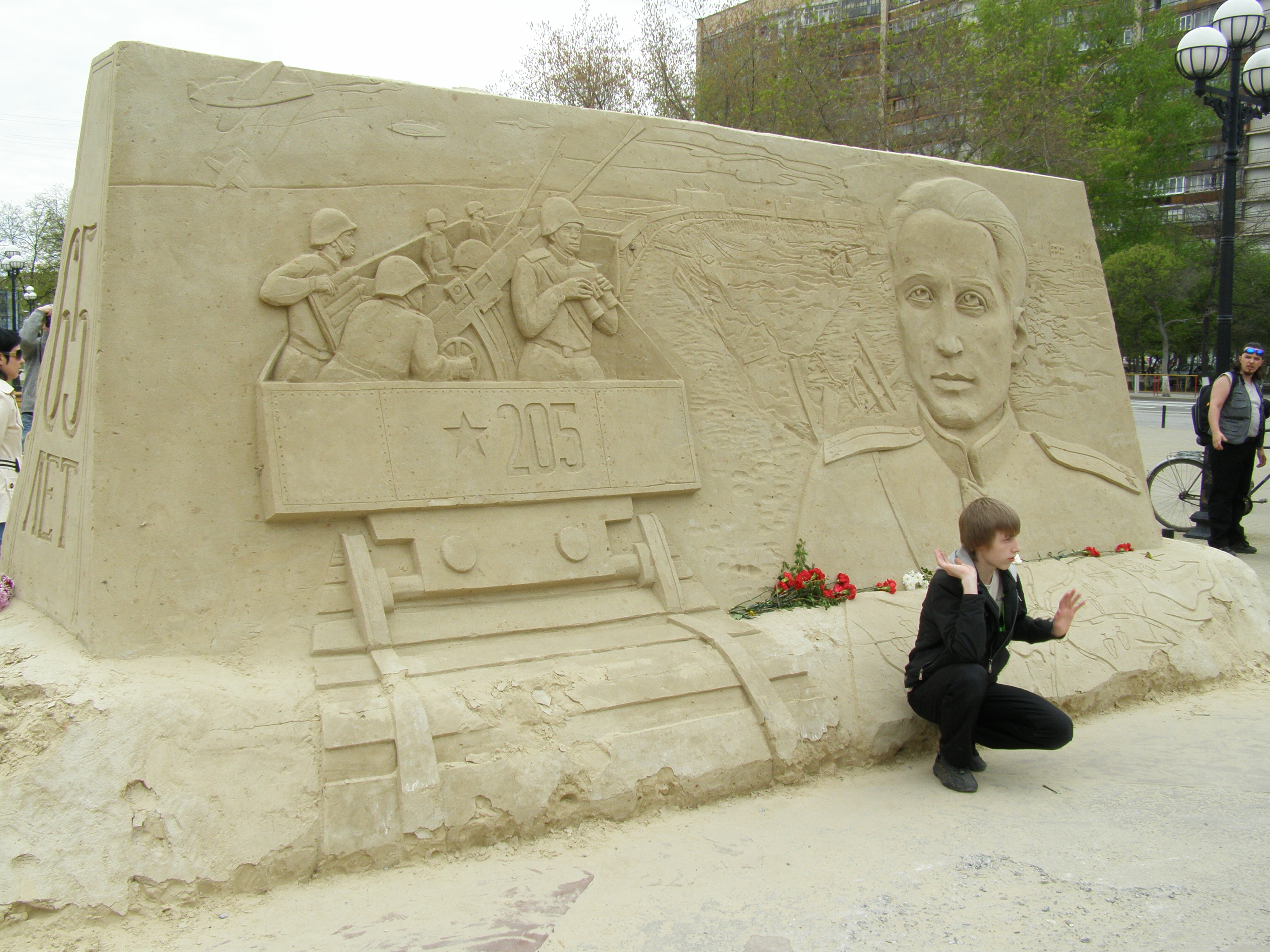 Sablomonumento okaze de la Venkotago. Tjumeno, Rusio.